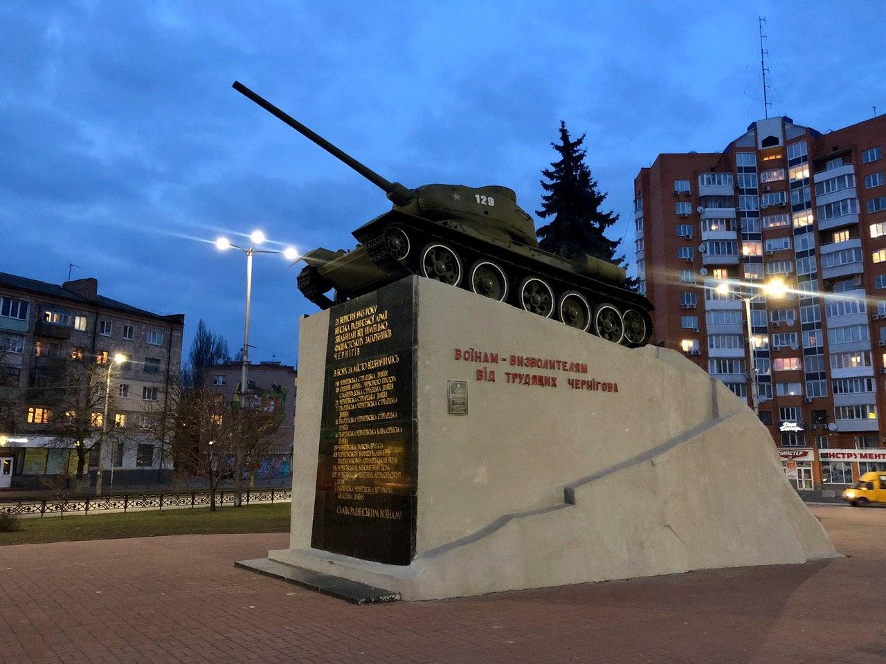 Т-34 Чернигов